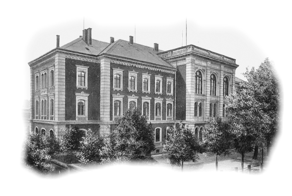 Das Schulgebäude des Hennebergischen Gymnasiums "Georg Ernst" gegen Ende des 19. Jahrhunderts.